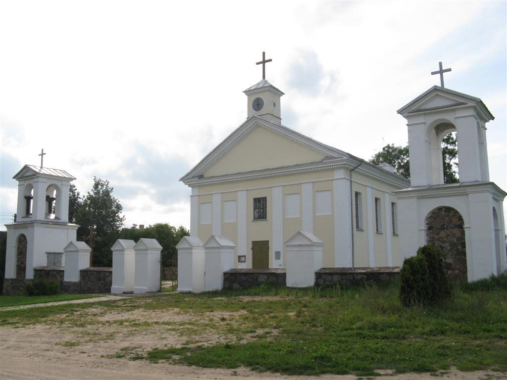 Aleksandravėlės Šv. Pranciškaus Serafiškojo bažnyčia